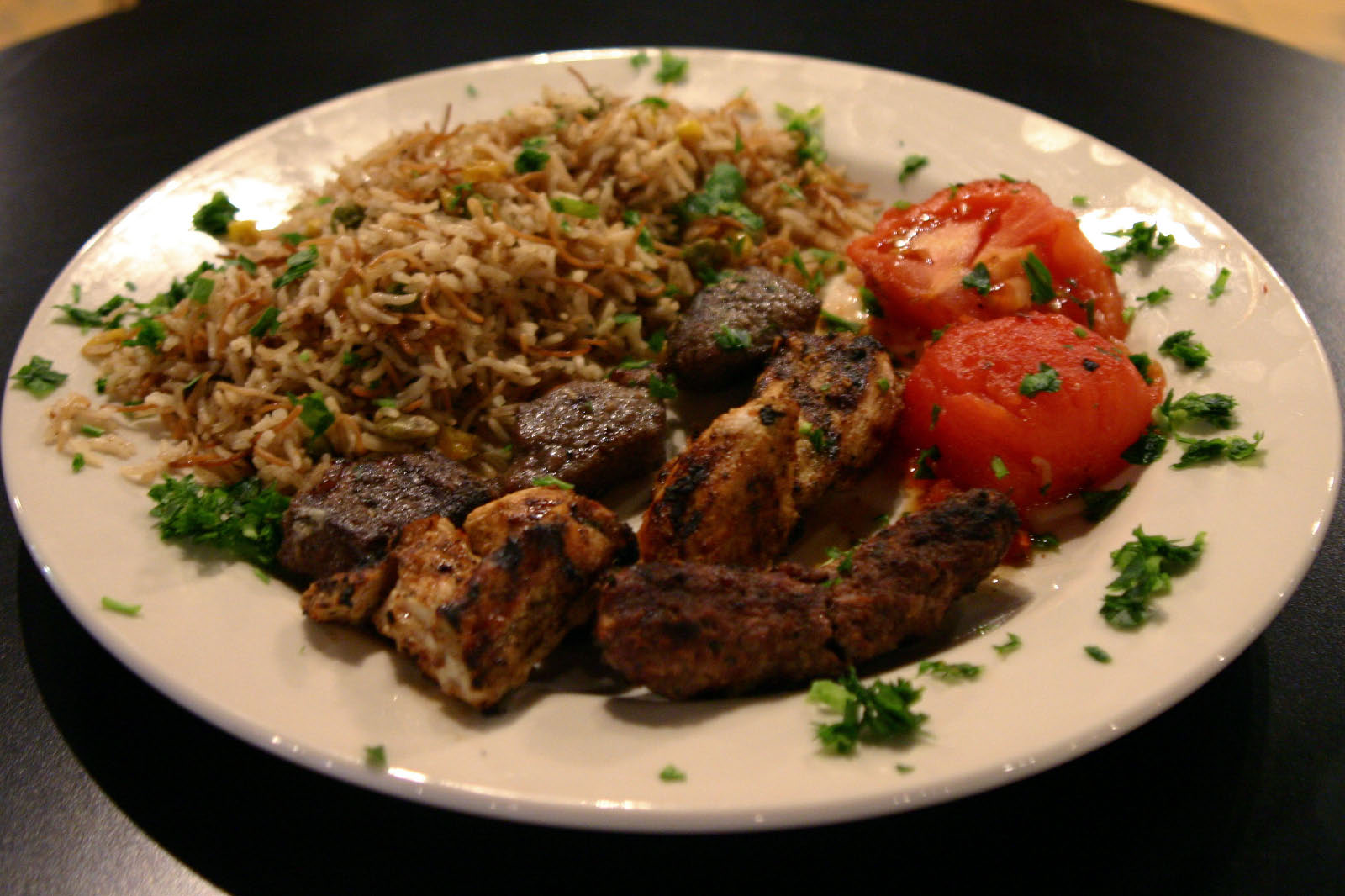 Kebab vari in piatto Foto di Richard [ Max ] Shirley, College Park, GA ( Prelevata da: Descrizione dalla pagina menzionata: "Shish Tawook (chicken), Beef Keftta Kebab and Classic Shish Kebab (with a side of fluffy rice and tomato)"